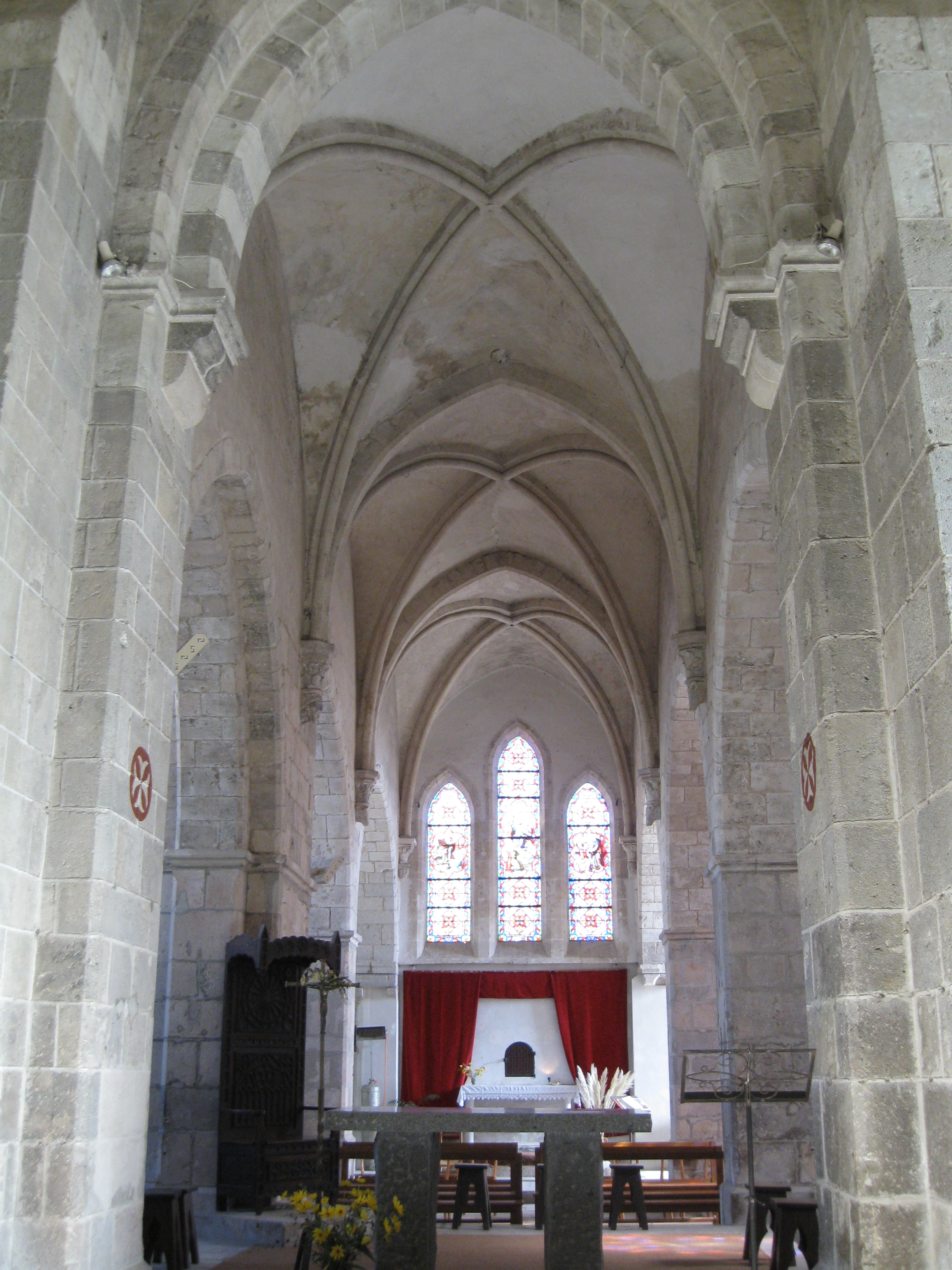 Église Saint-Martin, Mardié, Loiret, France